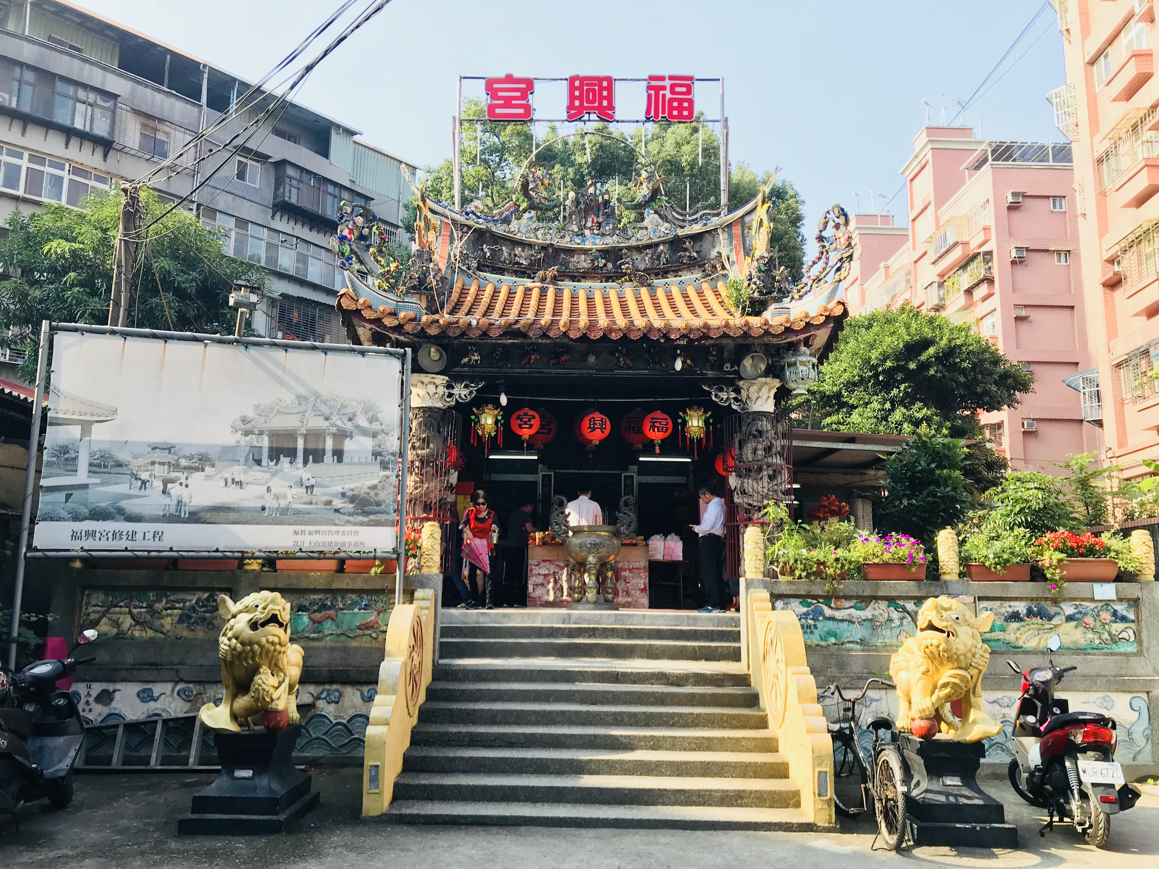 景美福興宮，又名十五份福興宮，位於台北市文山區福興路口